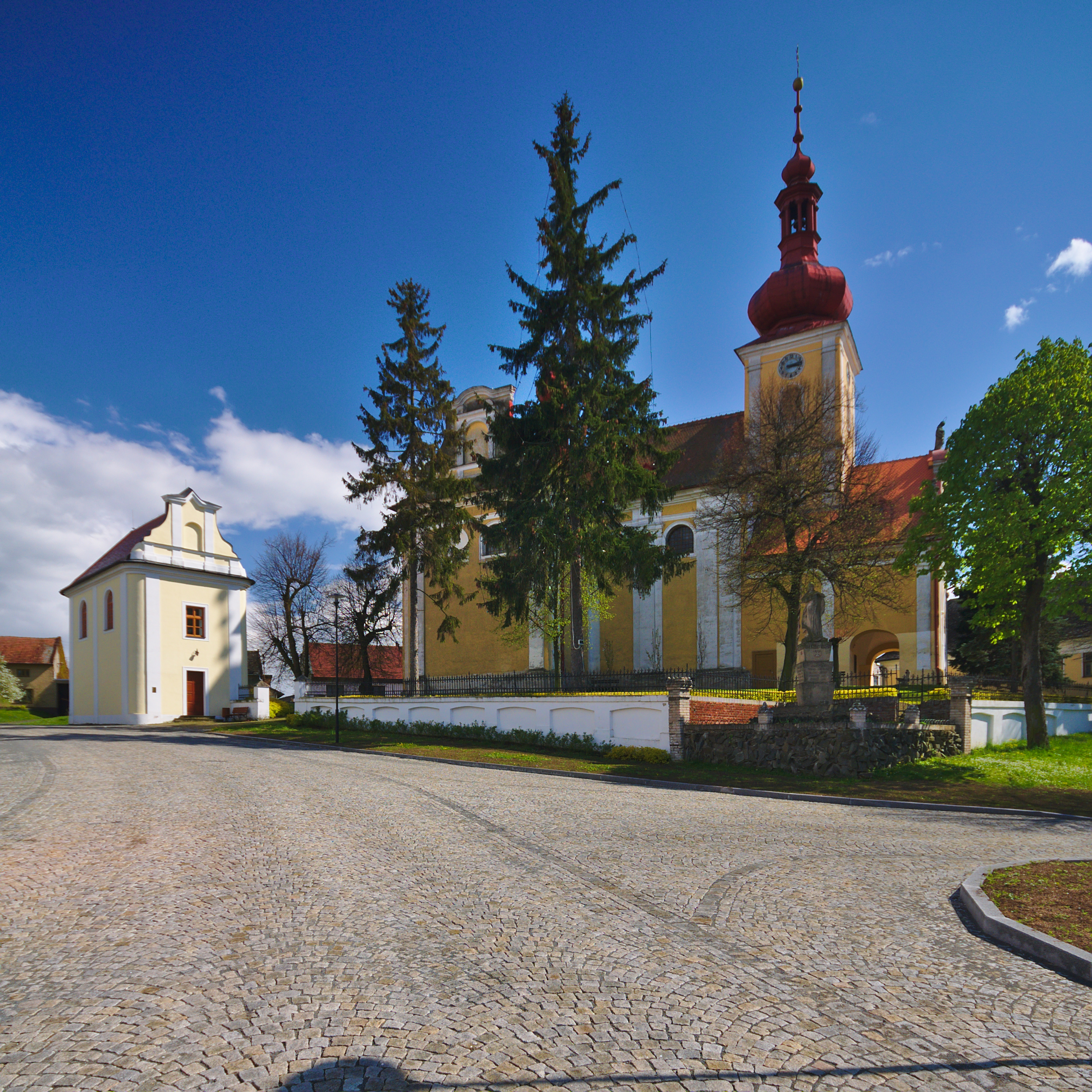 Kostel svatých Petra a Pavla, Tištín, okres Prostějov